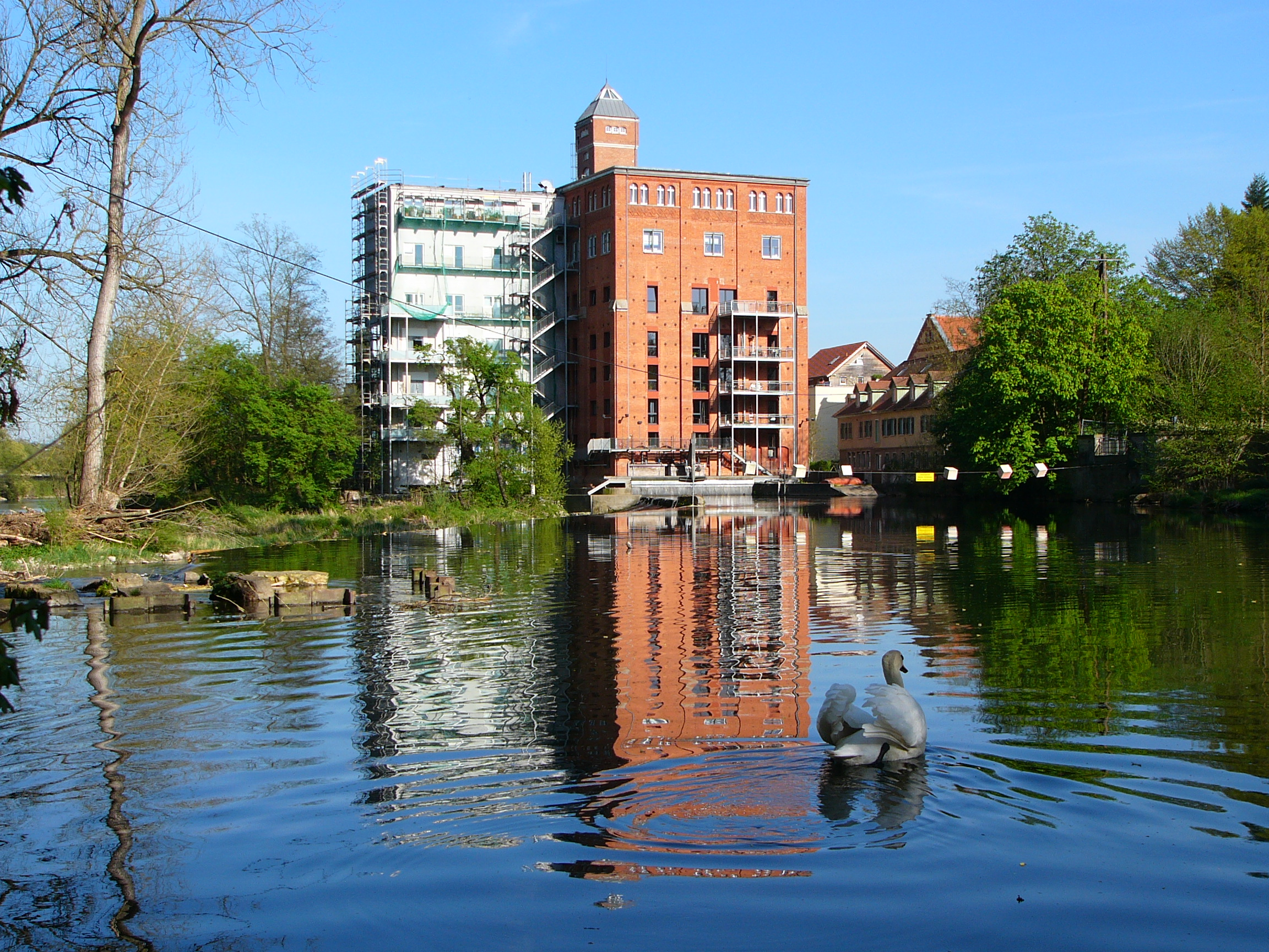 Rommelmühle von Westen, Spiegelung in der Enz leicht gestört